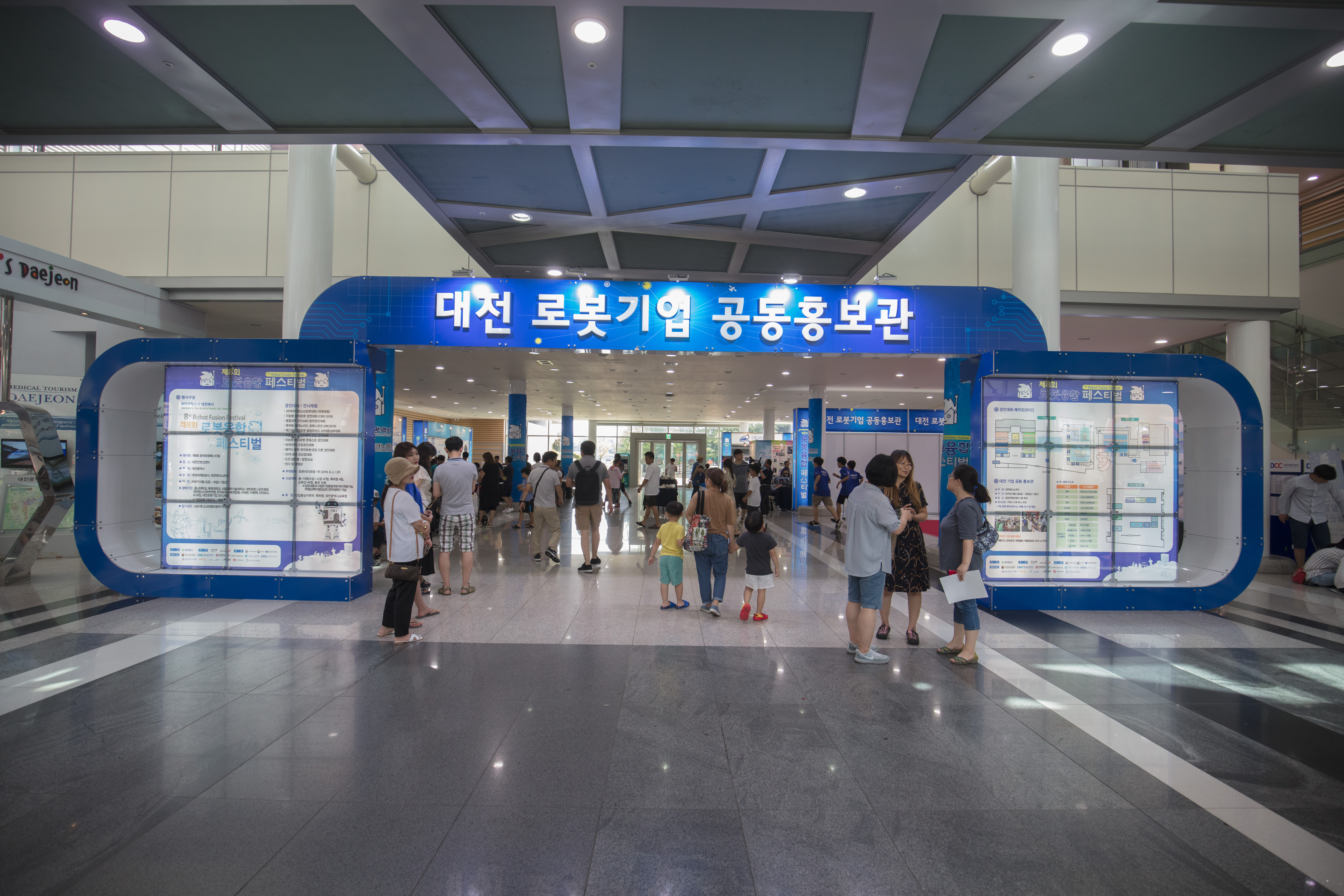 2019 대전로봇융합페스티벌 홍보관